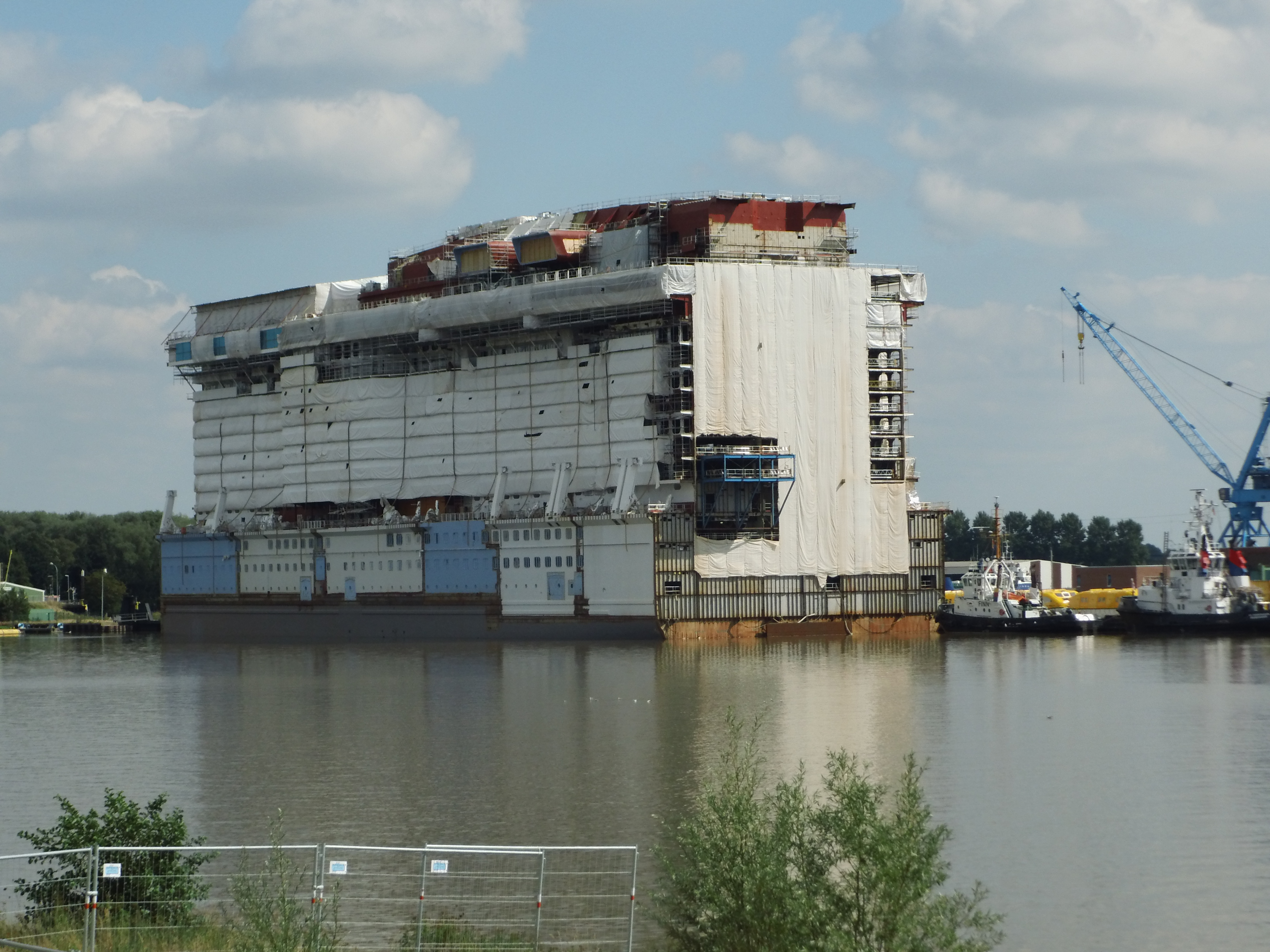 Part of Spectrum of the Seas at Meyer Weft.